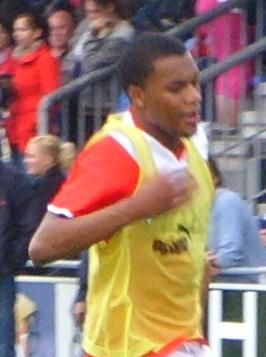 Gregory Schaken tijdens de eerste training van het seizoen 2008-2009 van FC Utrecht.